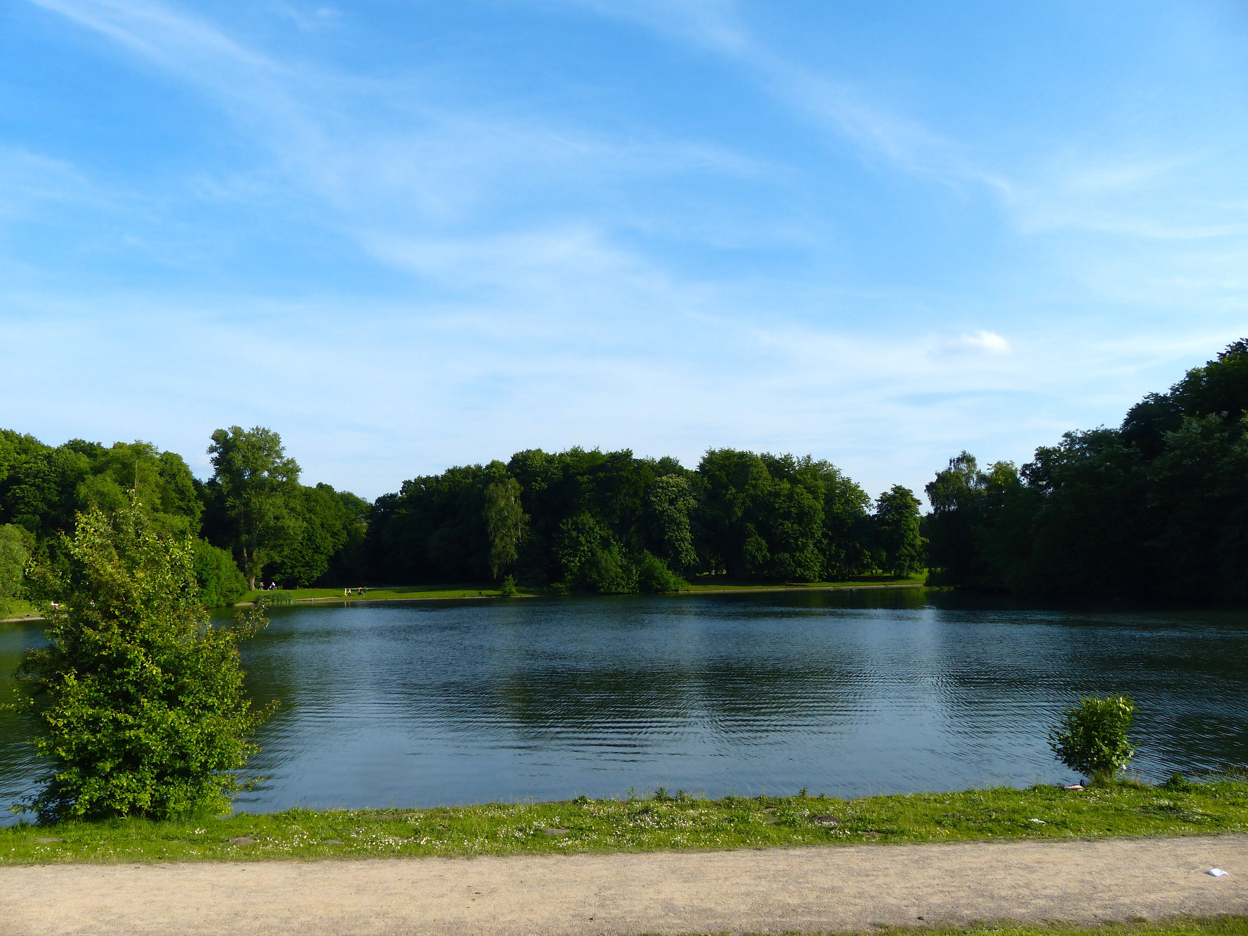 LSG Äußerer Grüngürtel: Decksteiner Weiher